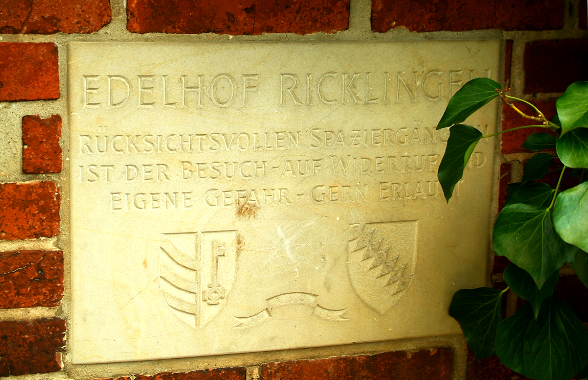 Sie haben ein besseres Bild? Sogar ein historisches Dokument als Bild(ungsförderung)? Zeigen Sie' s uns. Stiften Sie es, allen Menschen.